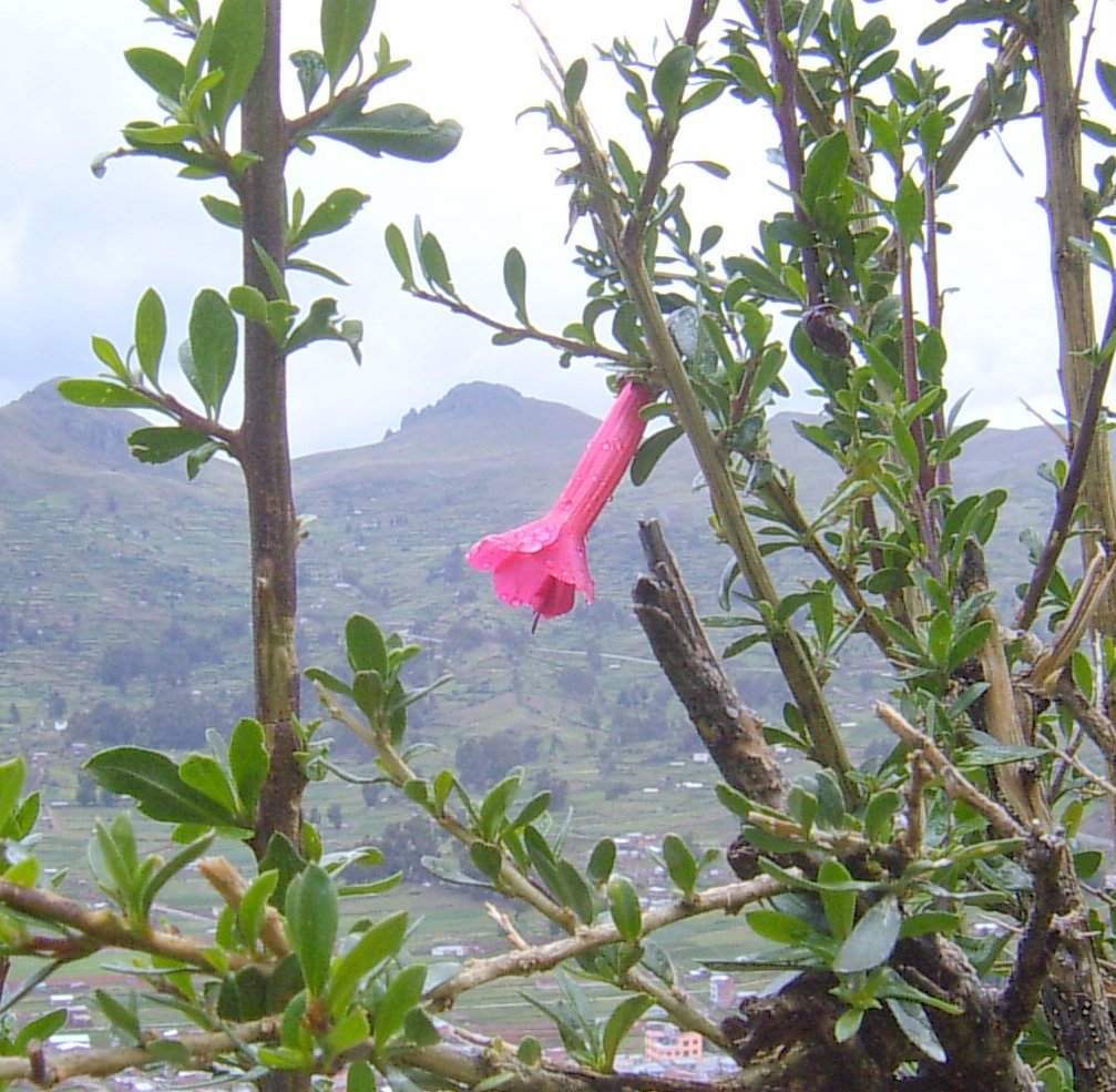 Foto tomada en la población de Copacabana en Bolivia. Cantua buxifolia.